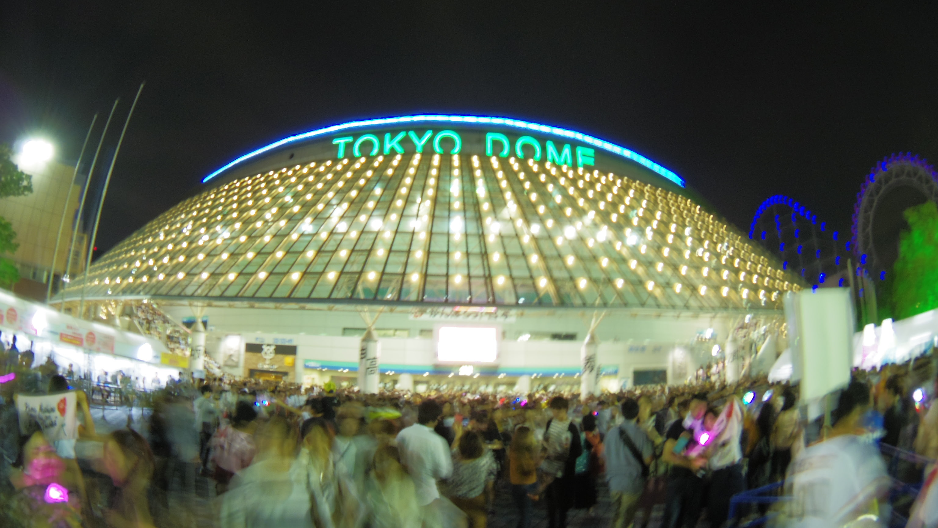 東京ドーム（東京都文京区後楽）外観（2017年9月24日夜撮影）。